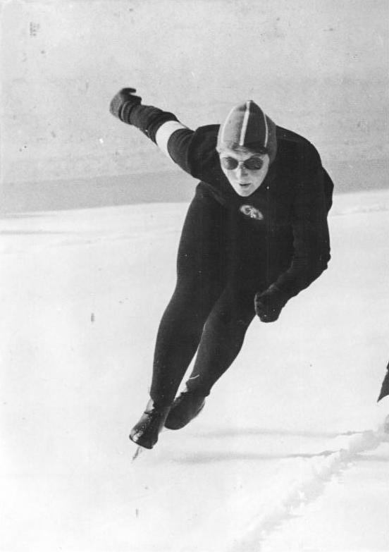 Inge Görmer Zentralbild ATP 3.2.1960 DDR-Olympiateilnehmer für die gemeinsame deutsche Mannschaft zu den 8.Olympischen Winterspielen in Squaw Valley vom 18. bis 28.2.1960 UBz: Eisschnelläuferin Inge Görmer. Abgebildete Personen: Görmer, Inge: Eisschnelläuferin, Olympiateilnehmerin 1960, DDR